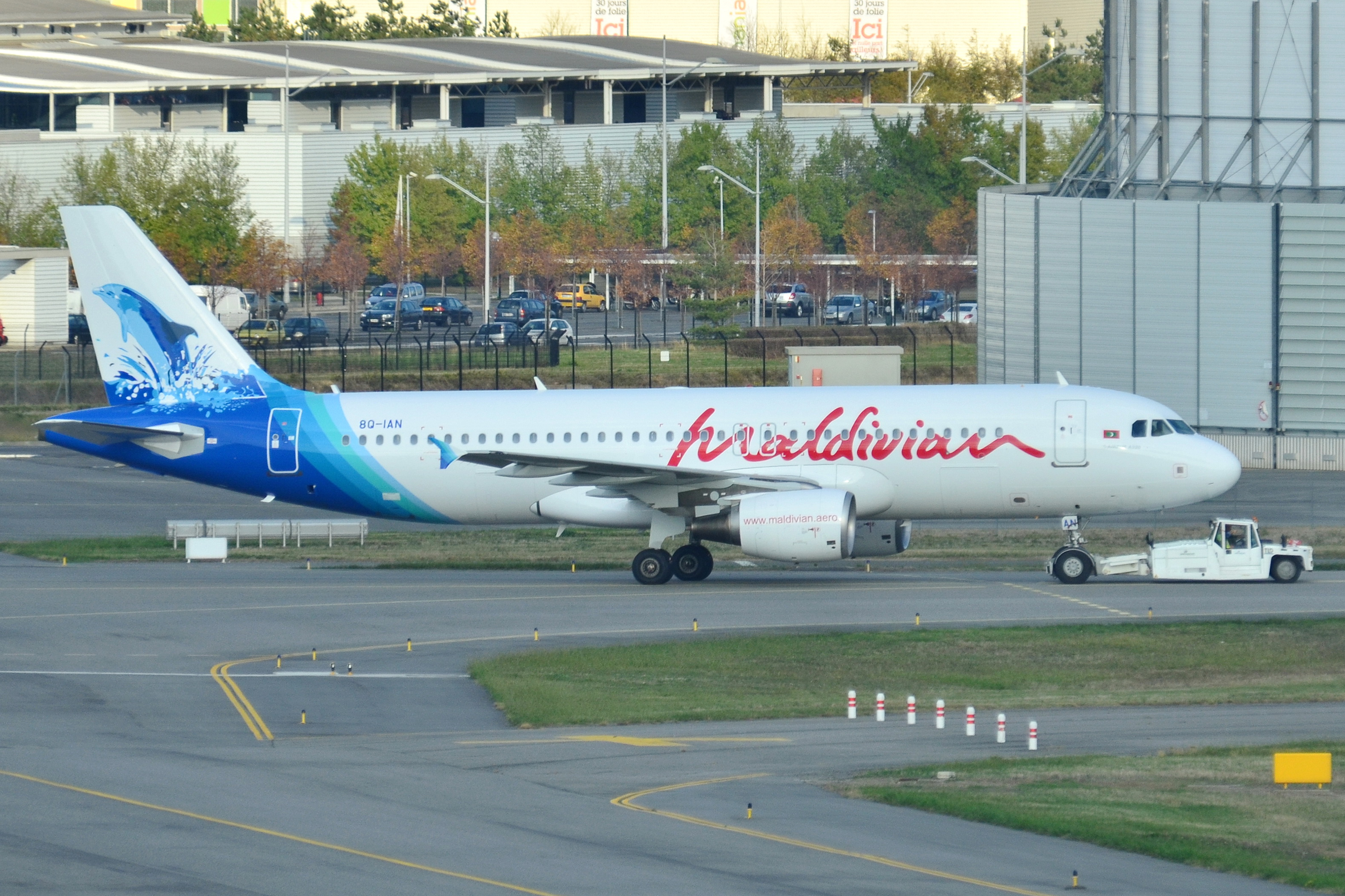 Photo prise à l'aéroport de Toulouse-Blagnac (LFBO) en France. Airbus A320-200 Maldivian (DQA) 8Q-IAN - MSN 2347 Picture take at Toulouse-Blagnac Airport (LFBO) in France.